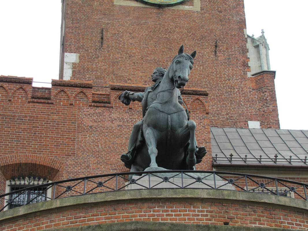 WAWEL. POMNIK TADEUSZA KOŚCIUSZKI.